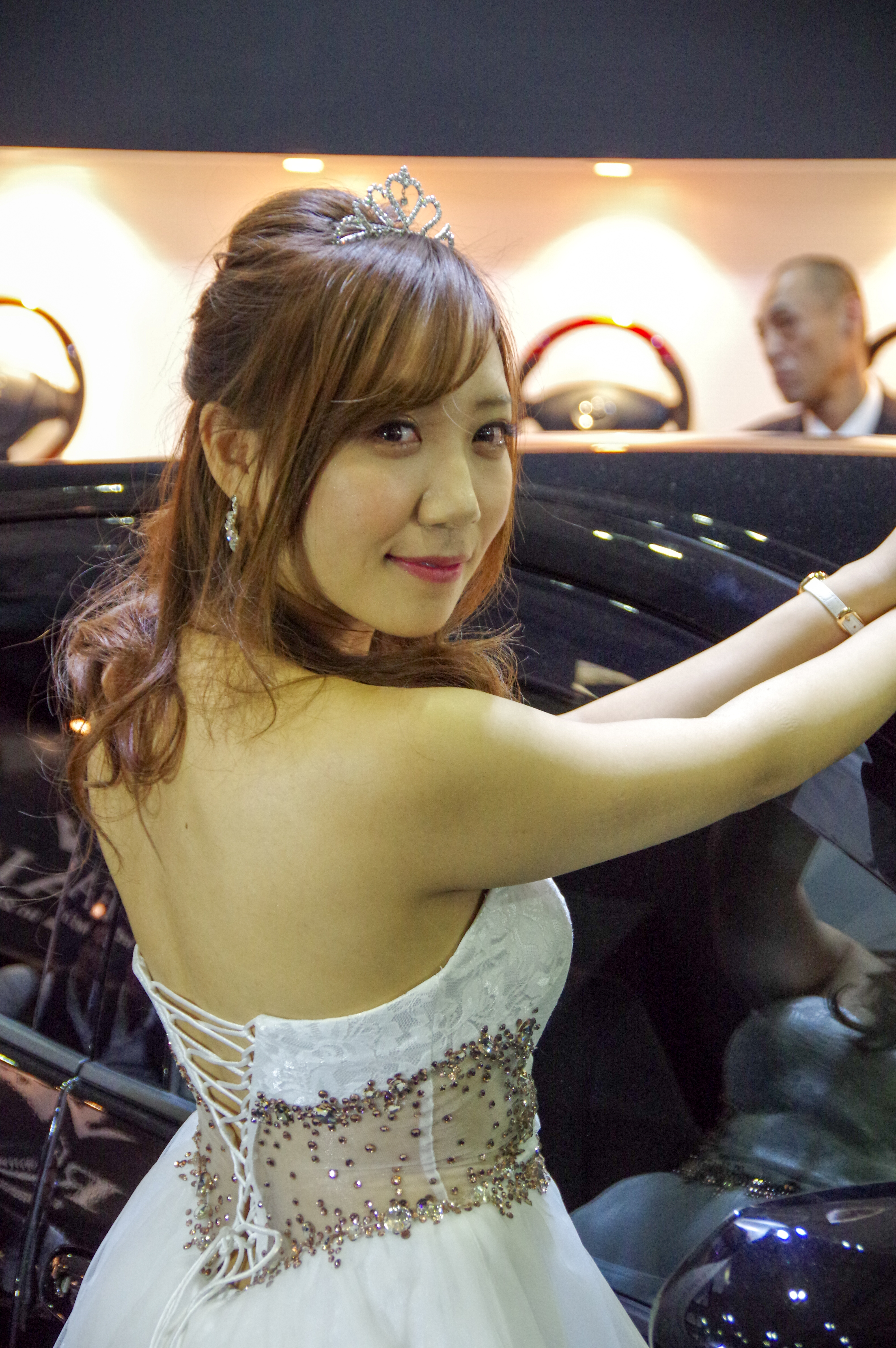 TOKYO AUTO SALON 2016 _82